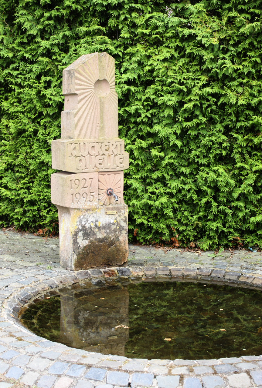 Der Kluckert Brunnen Lösnich 2014.